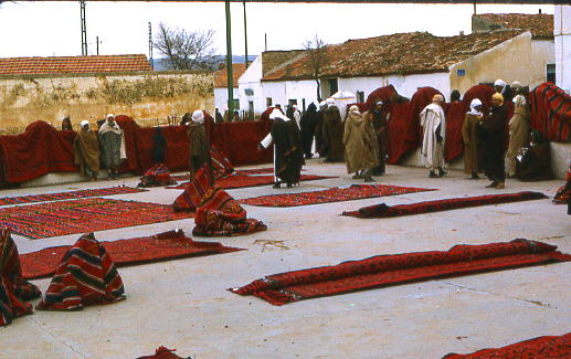 Larché aux tapis d'Aflou (Algérie), 1973